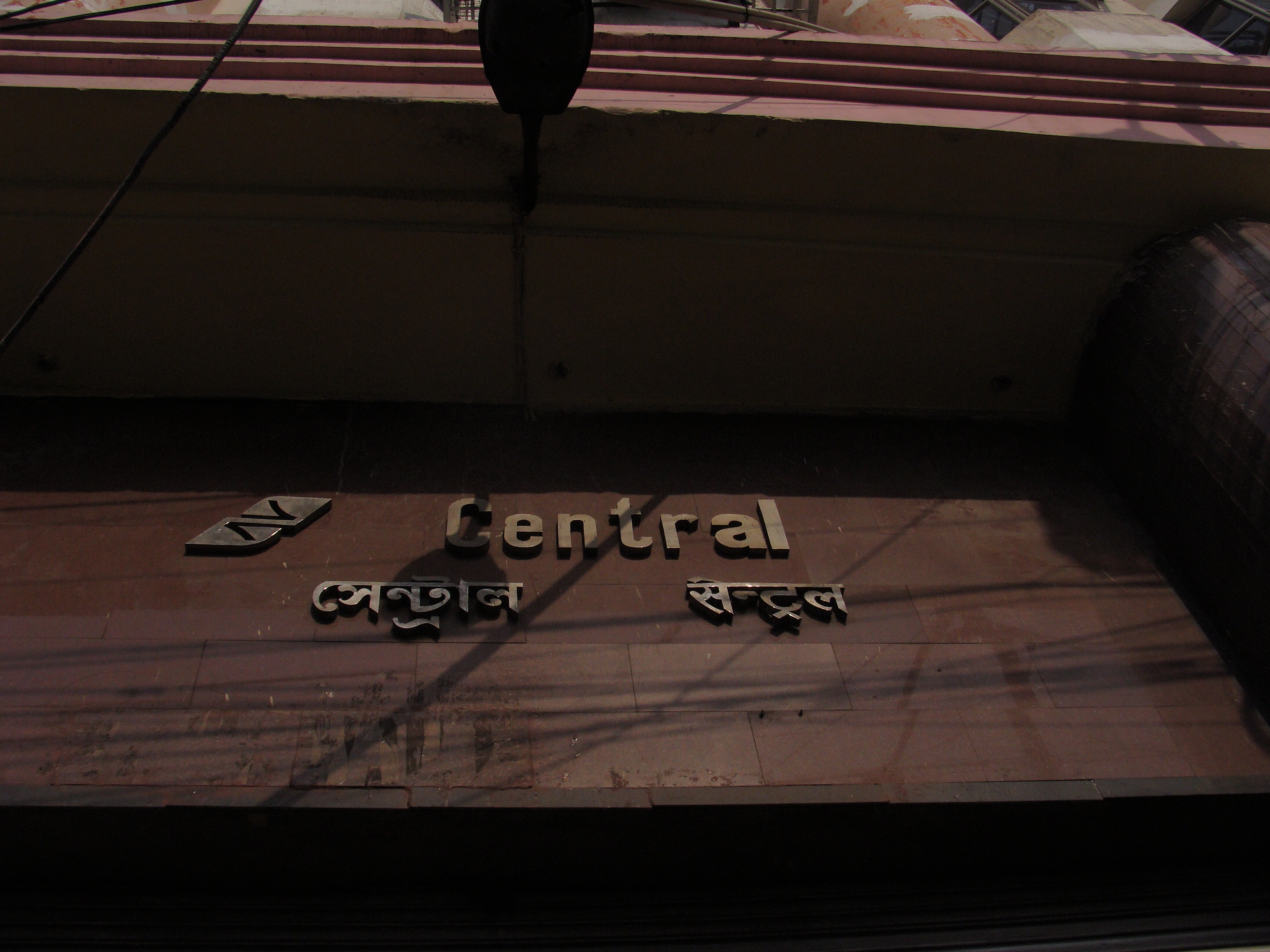 সেন্ট্রাল মেট্রো স্টেশন,কলকাতা(২)